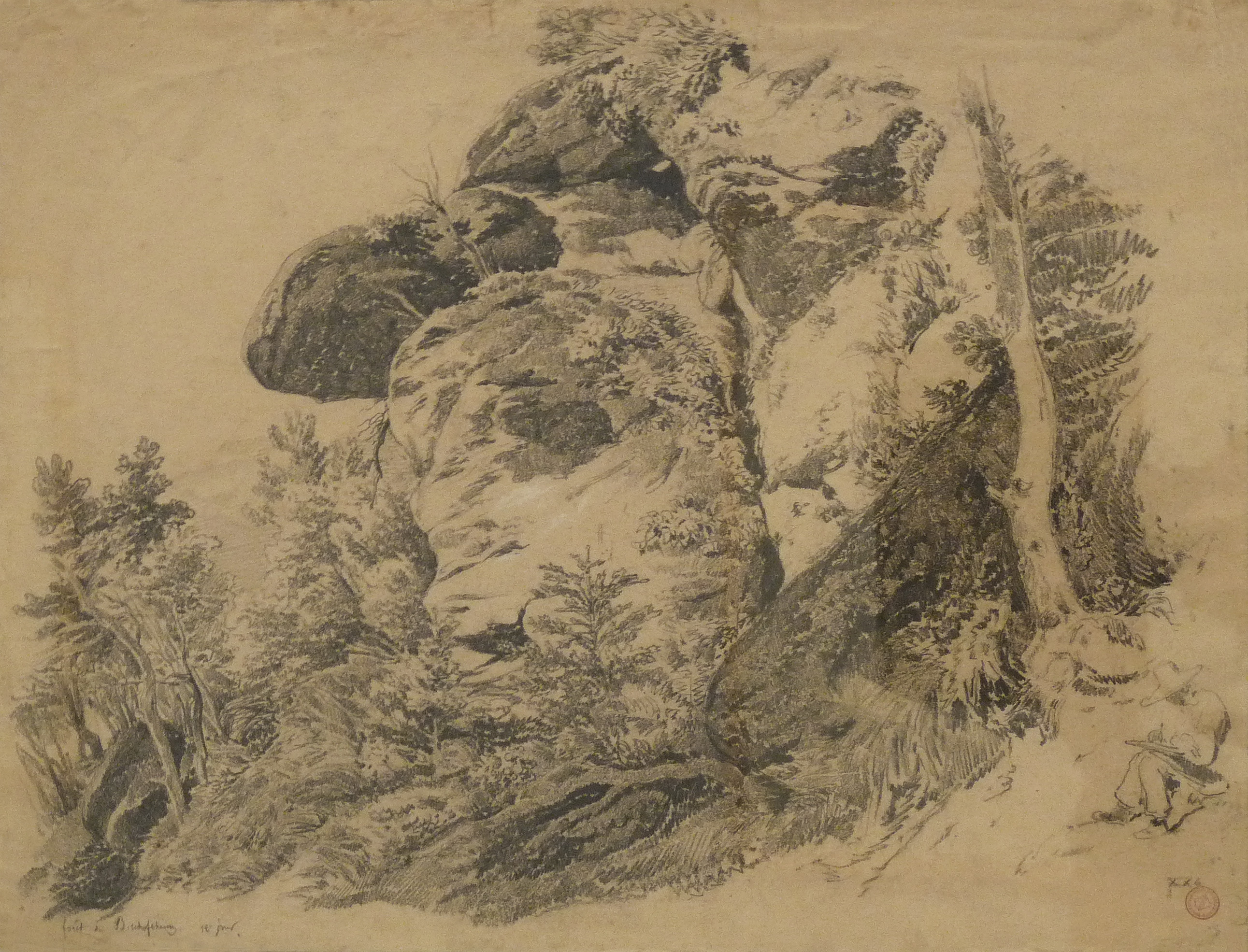 Gustave Brion, Forêt de Bischoffsheim, "12e jour", crayon gras sur papier beige, 1844, Cabinet des estampes et des dessins de Strasbourg.